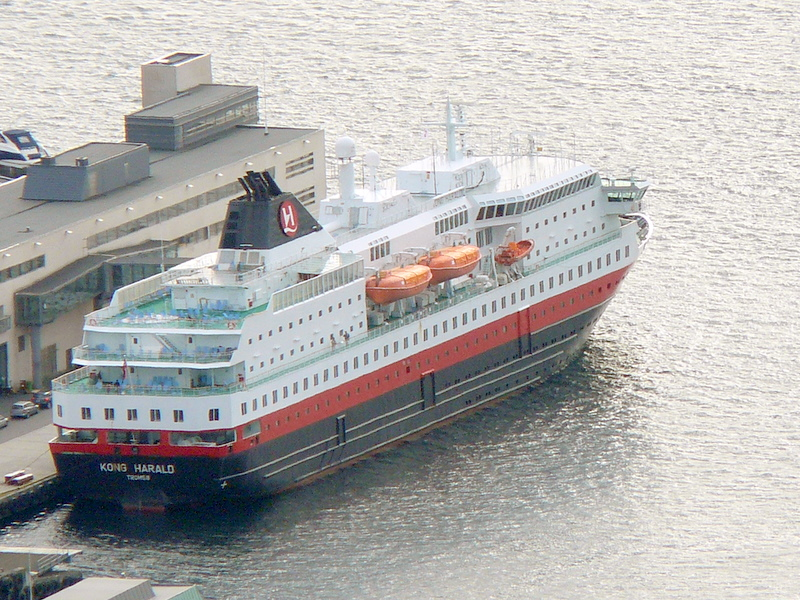 MS Kong Harald, port de Bergen, 20h30, prêt à partir avec ses nouveaux passagers